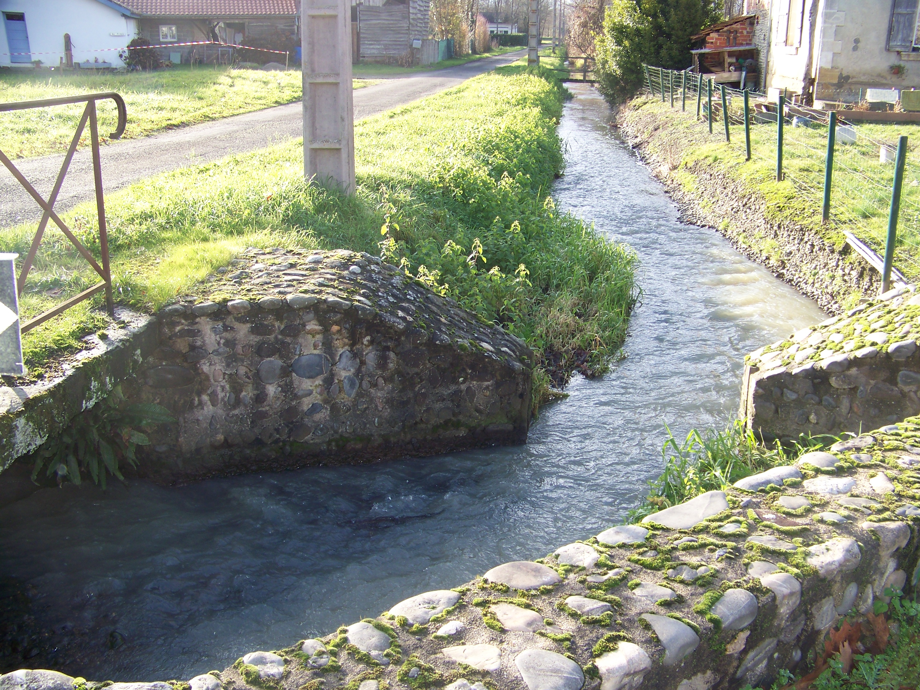 Izotges. Canal des Moulins (réuni au canal de l'Alaric depuis la commune de Belloc) quelques kilomètres avant de rejoindre l'Arros.